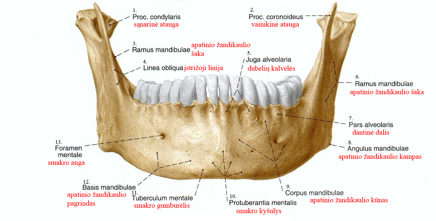 veidinės dalies kaulas